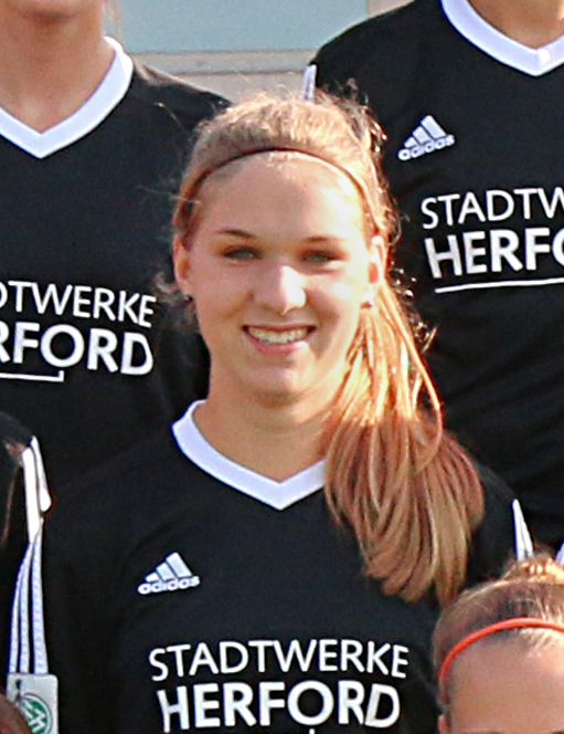 Herforder SV Borussia Friedenstal Team 2014/2015